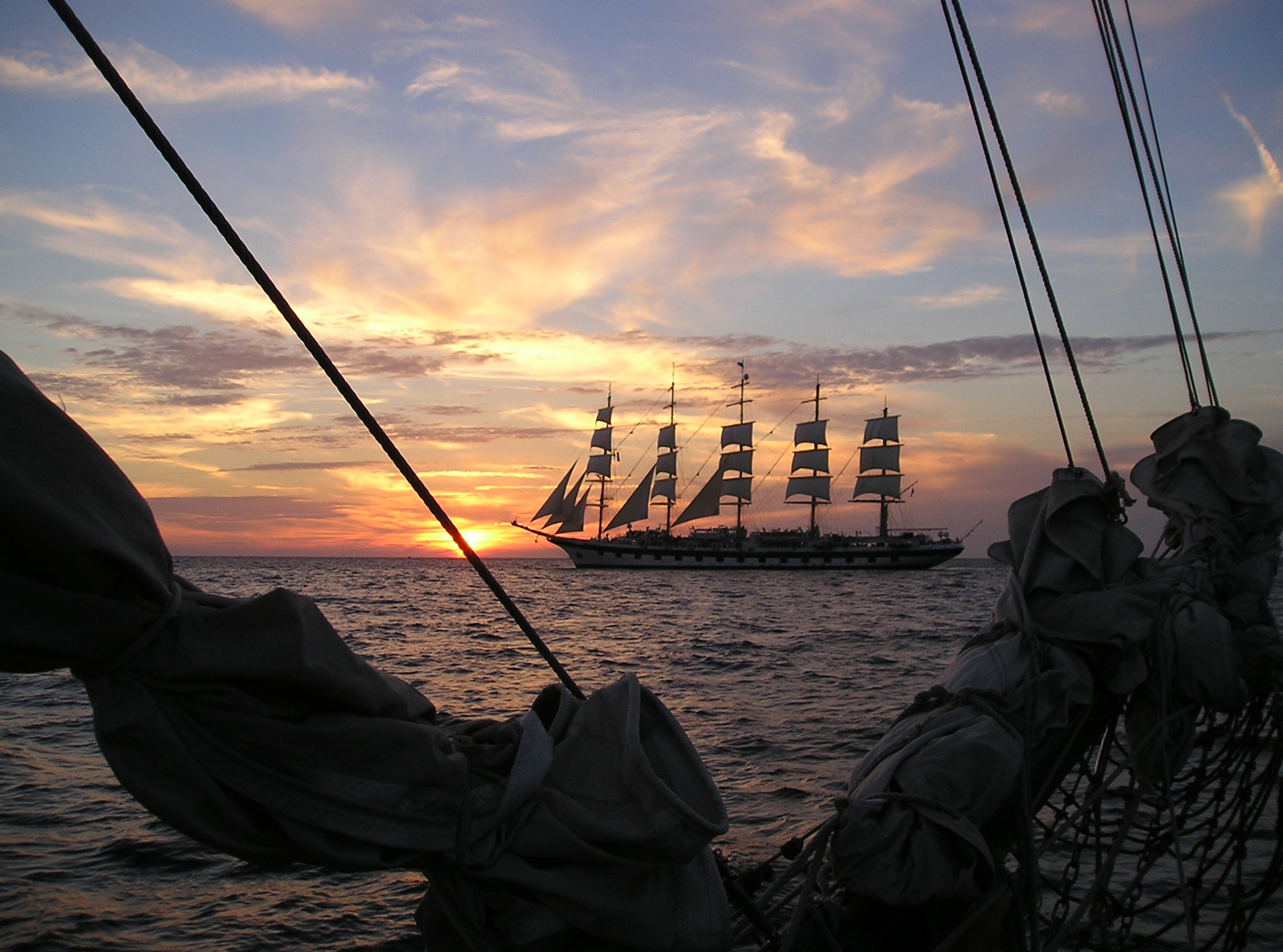 Fünfmastvollschiff Royal Clipper vor Pula von der Brigantine "Falado von Rhodos" aus fotografiert.